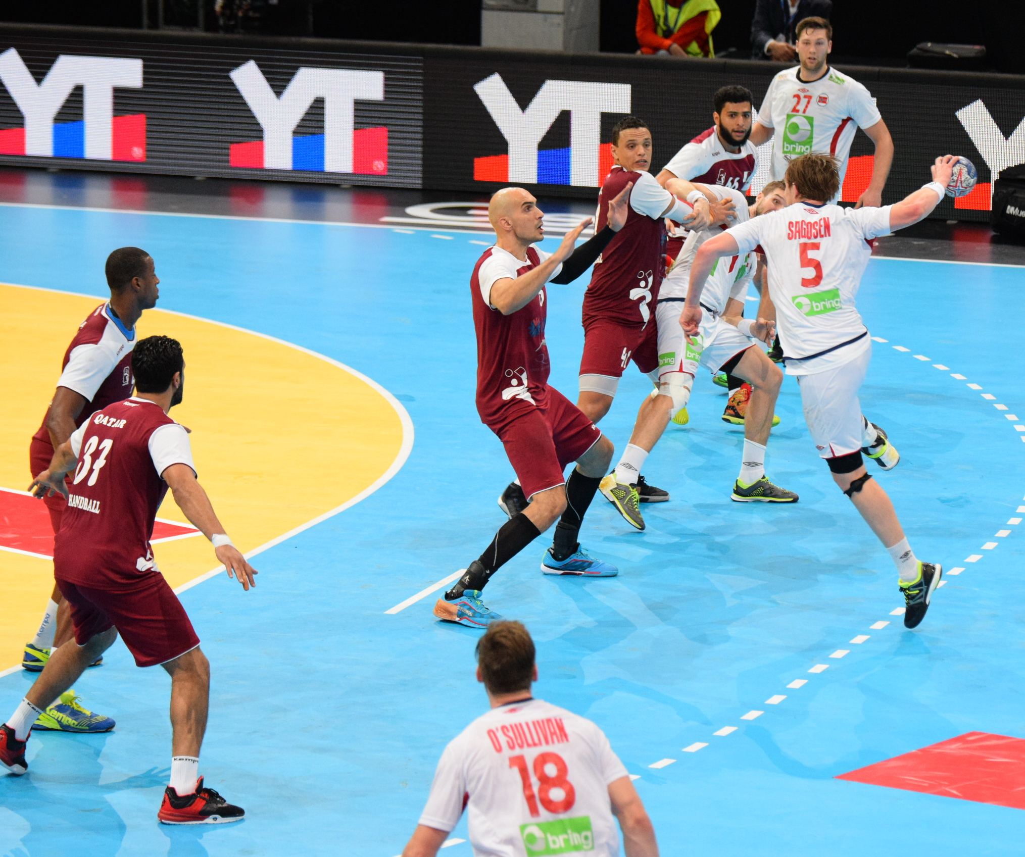 Le 10 janvier 2016 lors du match Norvège / Qatar durant la Golden League à l'AccordHotel Arena (Paris). Sander Sagosen